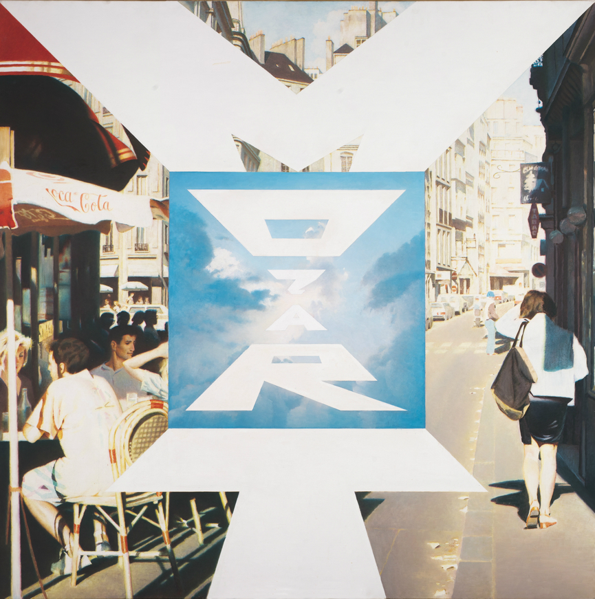 Эрик Булатов. Моцарт, 1991